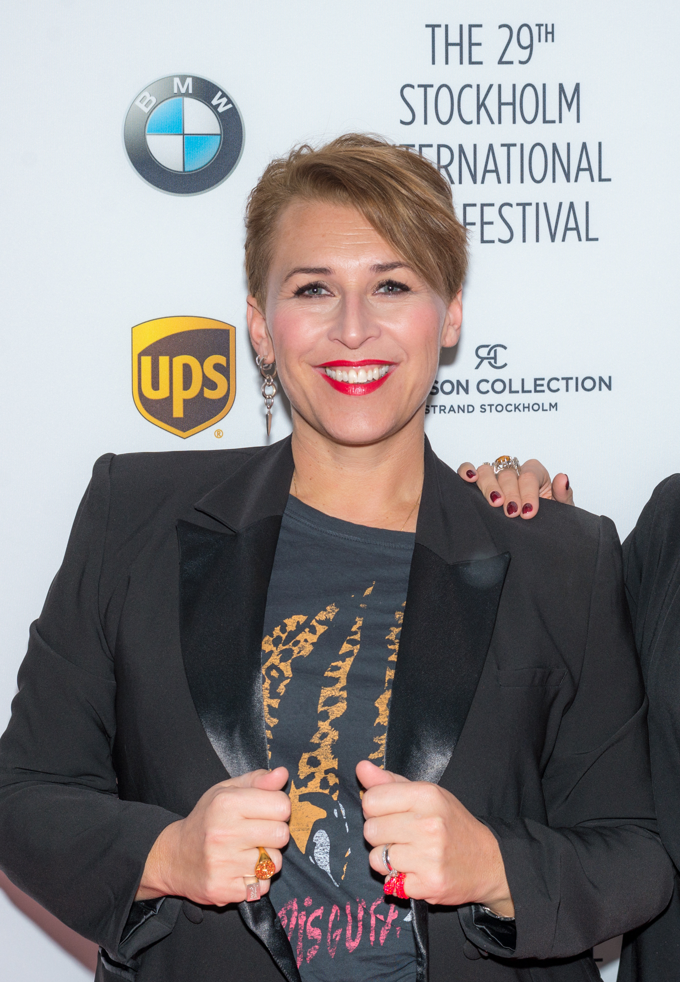 Hanna Widell på röda mattan inför prisutdelningen på Stockholms internationella filmfestival den 16 november 2018.